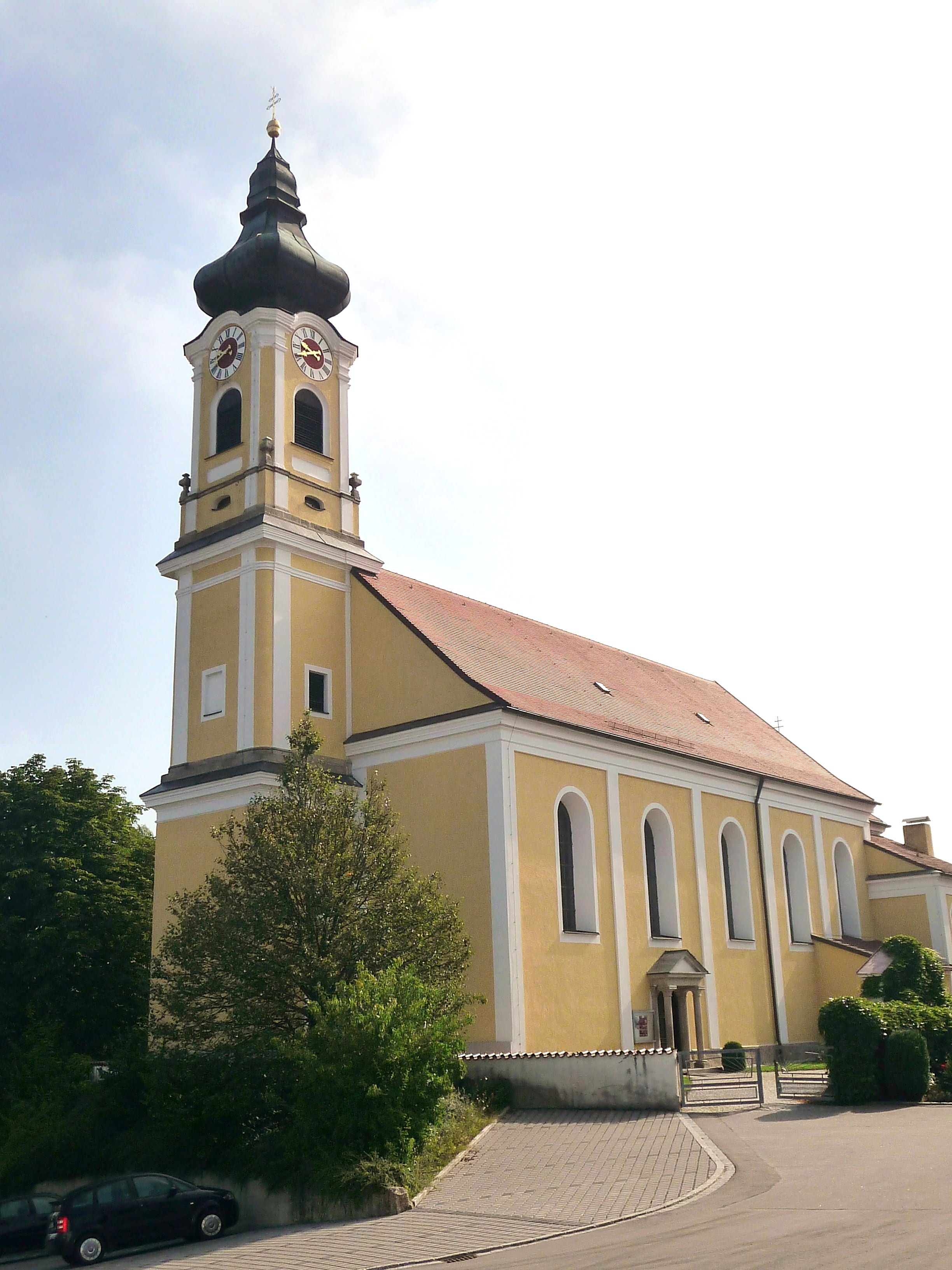 Die Pfarrkirche St. Stephan in Stephansposching